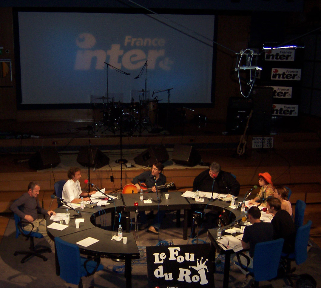 L'émission de radio Le fou du roi animée par Stéphane Bern sur France Inter en février 2003, avec pour invité l'auteur-compositeur-interprète Francis Cabrel. De gauche à droite : Vincent Roca, Stéphane Bern, Francis Cabrel et Guy Carlier.